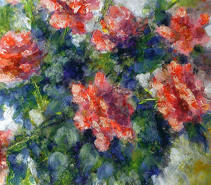 Bouquet de roses rouges; Pastel au couteau de Pierre Vallon